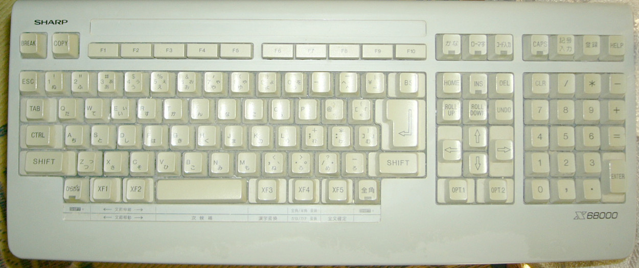 X68000付属のキーボード。